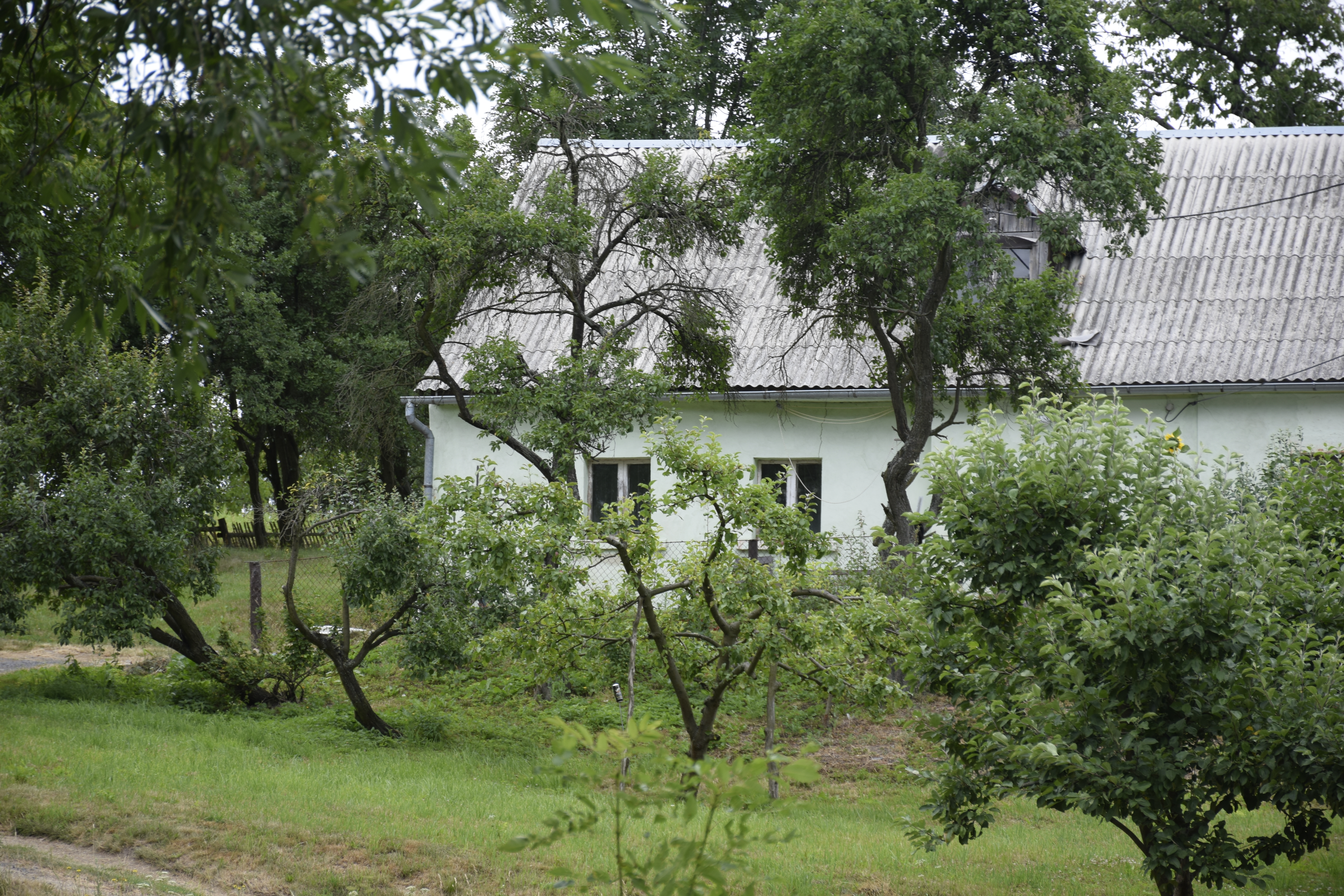 Gozdno (województwo dolnośląskie). Polska.